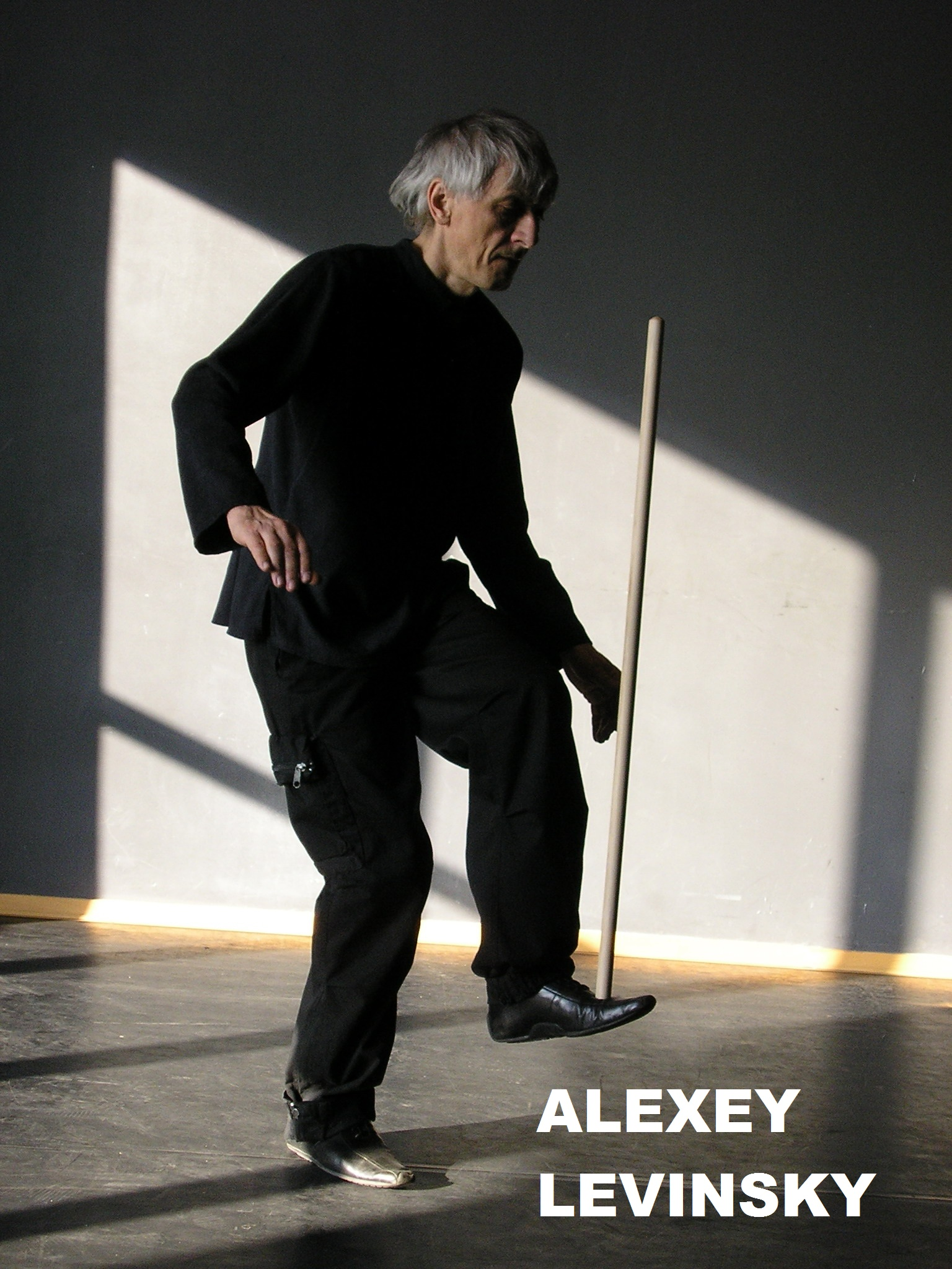 Алексей Александрович Левинский